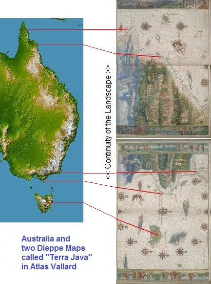 A costa leste da Austrália, e dois mapas de Dieppe que colam pelos desenhos aí representados.